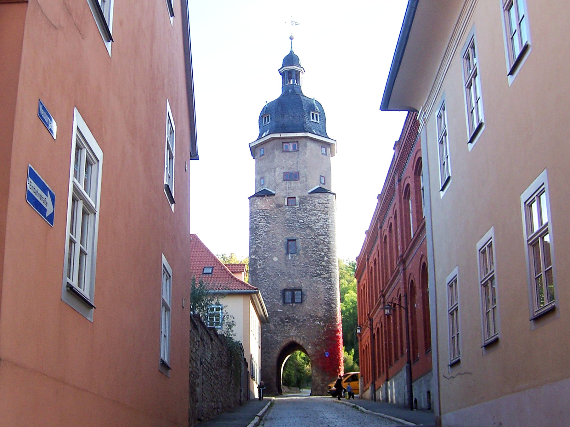 Tor der Stadtmauer in Arnstadt. Erste urkundliche Erwähnung 1418. Bis Ende des 19. Jahrhunderts mit einem Feuerwächter besetzt, der im Turm eine Wohnung hatte.